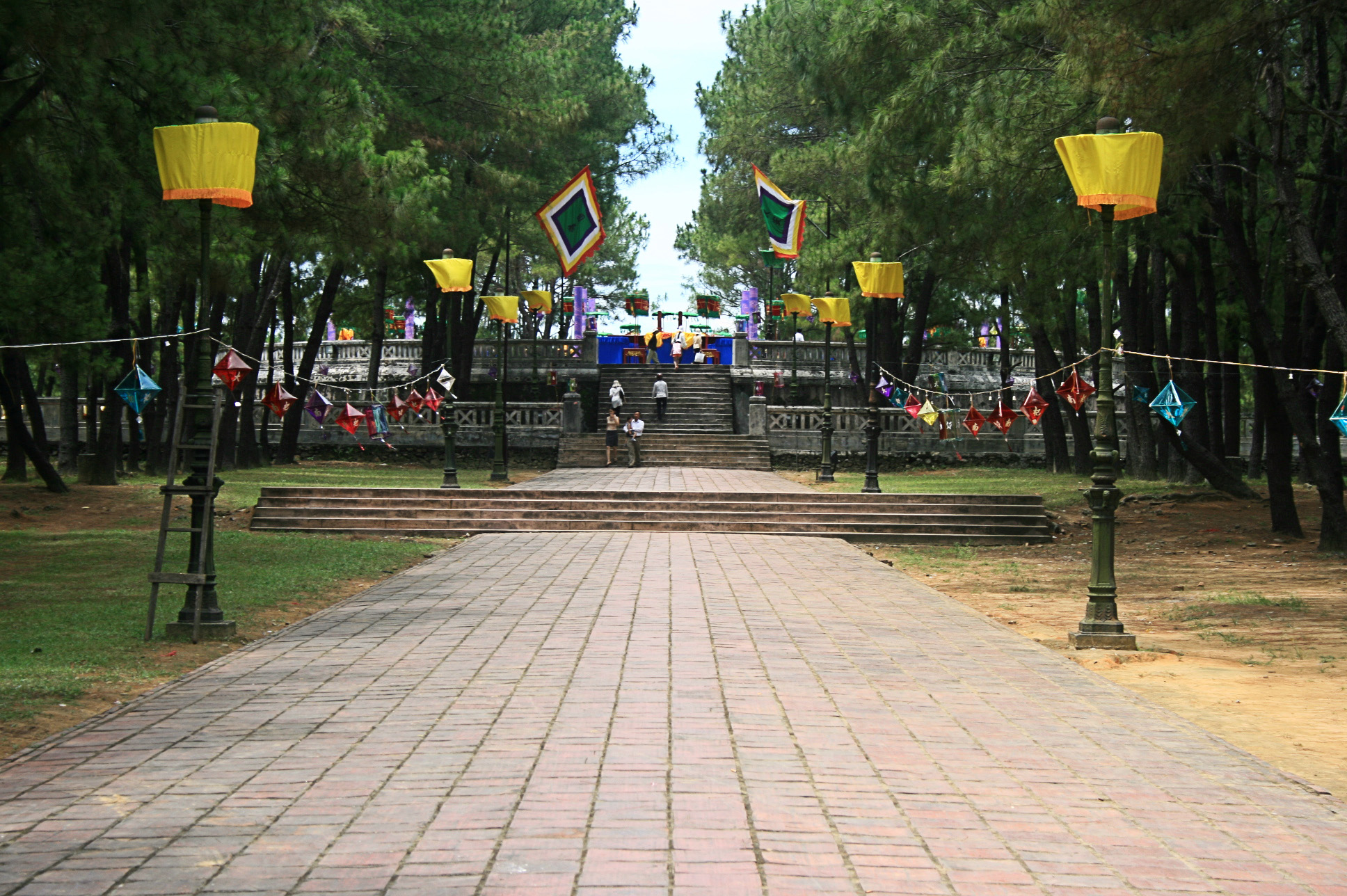 Di tích Đàn Nam Giao triều Nguyễn tại Huế.